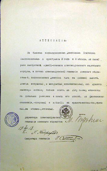 Директор Александровской гимназии военного ведомства. Аттестация. На подполковника Денисова Платона Сампсоновича. Петроград. 1918. 1 л. Формат 22 х 36 см. Выдана 2 мая 1918 года. ...В своей роли смотрителя ...был на должной высоте... хранил казенную копейку превыше всего.. в физическом отношении здоровый и крепкий, в нравственном - безупречный... Интересный артефакт знаменитого Александровского Кадетского корпуса. Основан в 1873 г. В 1918 переименован в Александровскую гимназию военного ведомства. Заверена двумя печатями: царской, кадетский корпус, орел с короной, и гимназии - орел без короны. Подпись директора: М.Бородин. Провенанс: архив подполковника Денисова